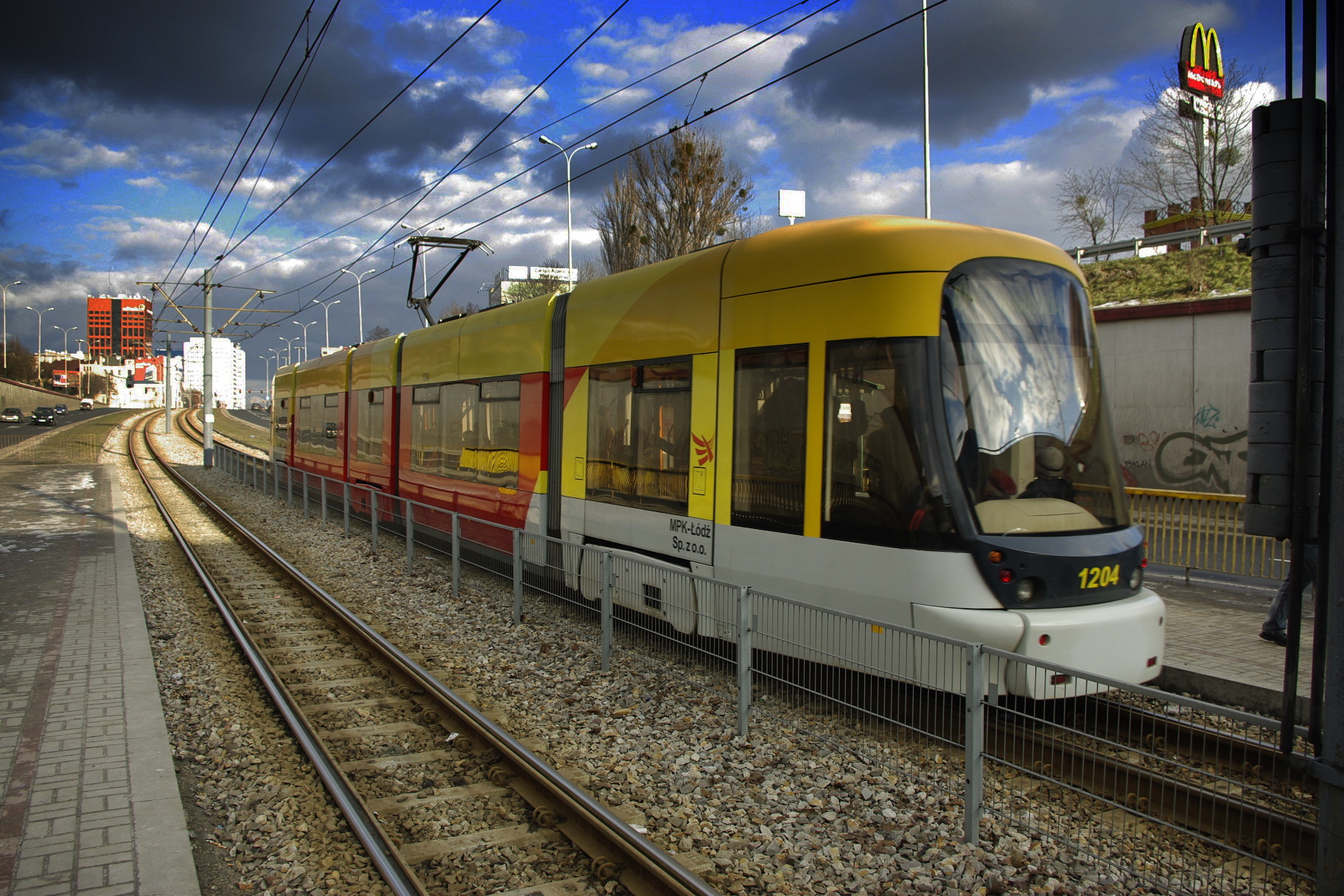 Cityrunner w drodze do centrum Łodzi